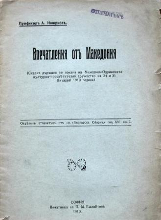 Корица на "Писма за Македония" на Христо Матов.